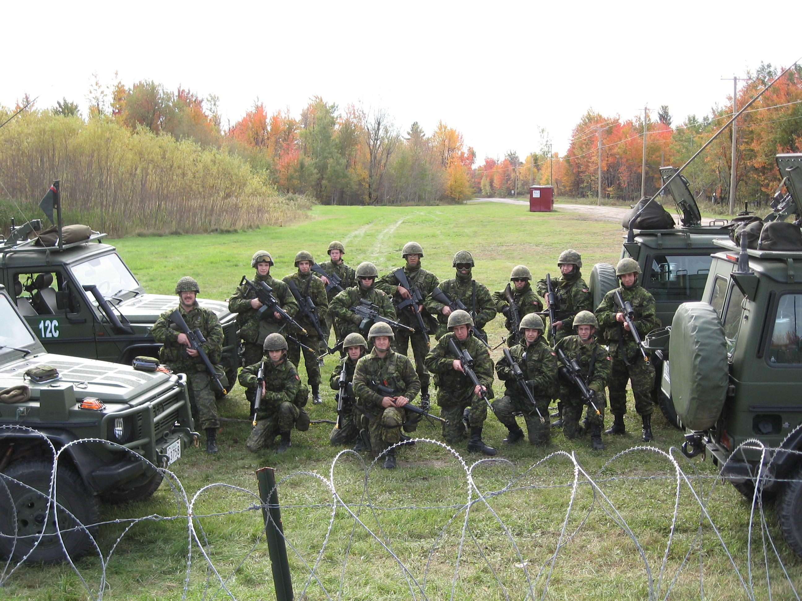 Membres du Sherbrooke Hussars, une unité réserviste de blindée canadienne, en entraînement. Membres du Sherbrooke Hussars en entraînement. Certains membres des troupes en entraînement.